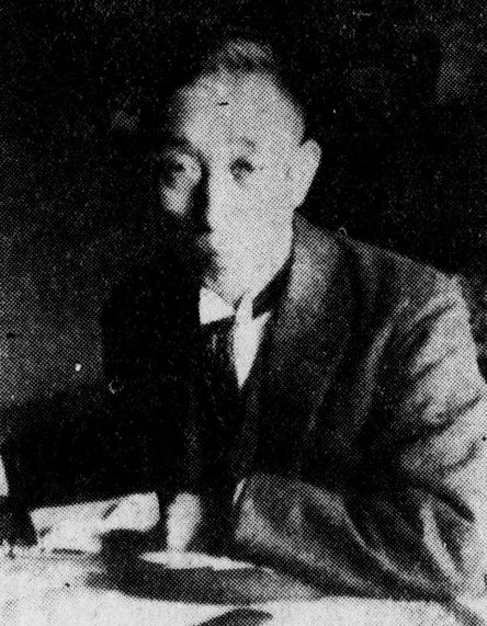 近松秋江（1876-1944）